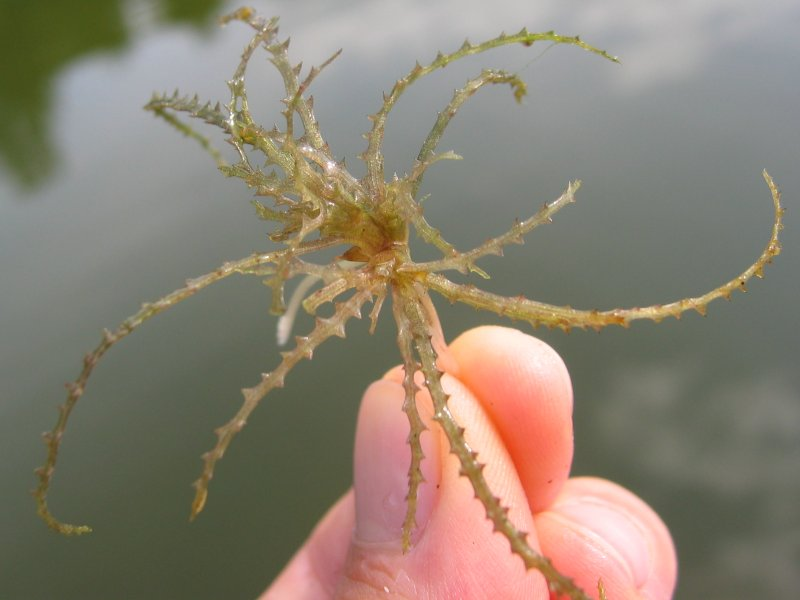 Großes Nixenkraut Najas minor, Müritz-Gebiet